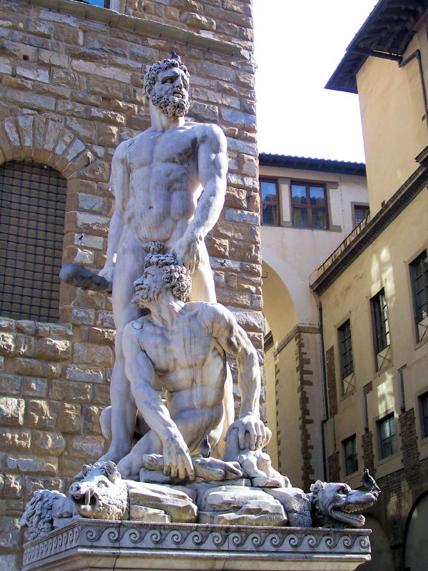 Héraclès et Cacus, Piazza Della Signoria, Firenze, Italia